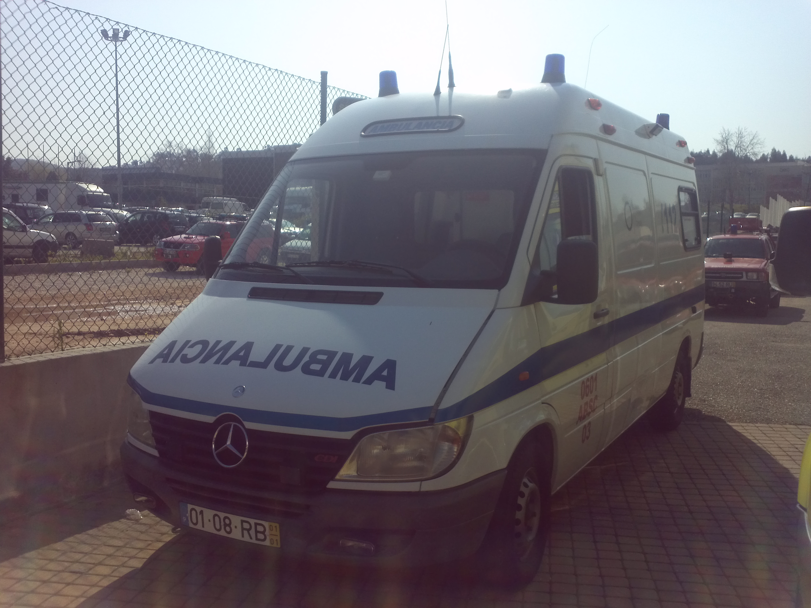 Ambulância de Socorro 03